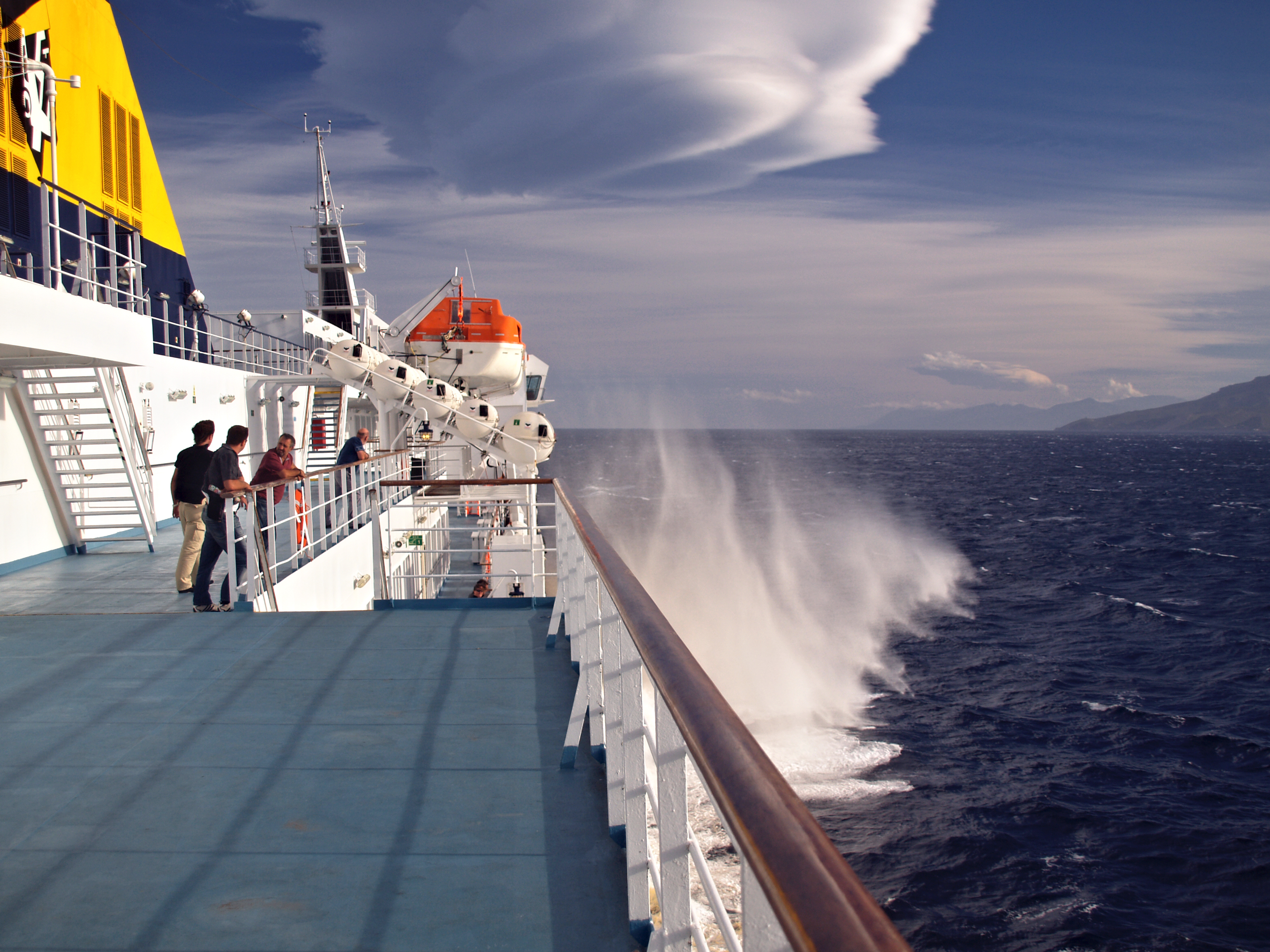 Bastia (Corsica) - Approche du port un jour de libeccio